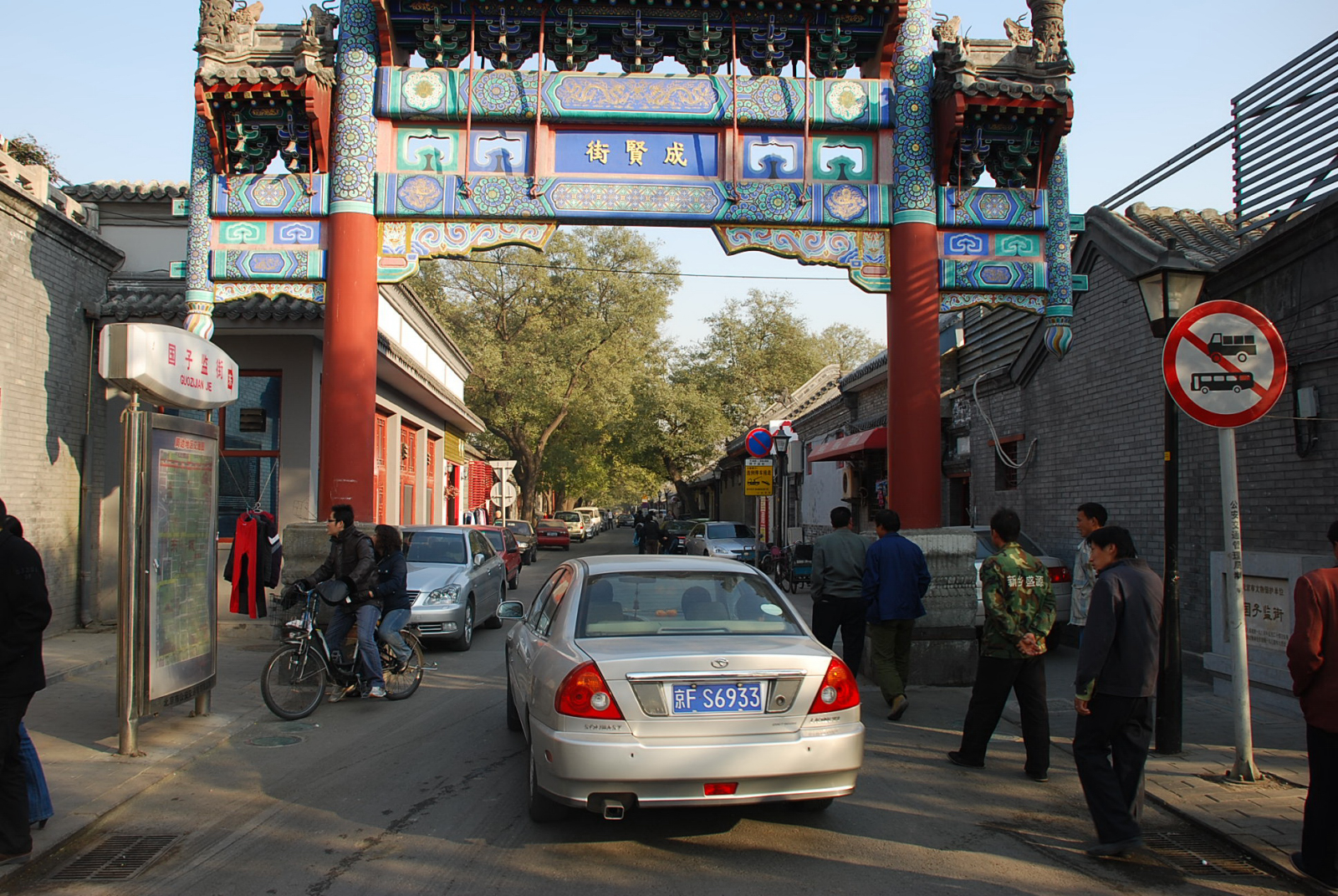 北京国子监街西入口